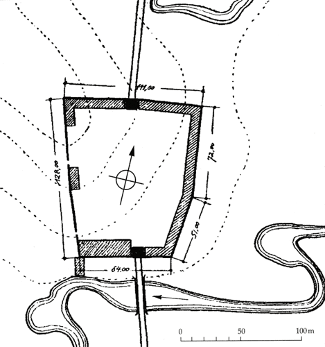 Šlokenbeka linnuse üldplaan, koostatud H. Pīrangsi poolt 1926 aastal.